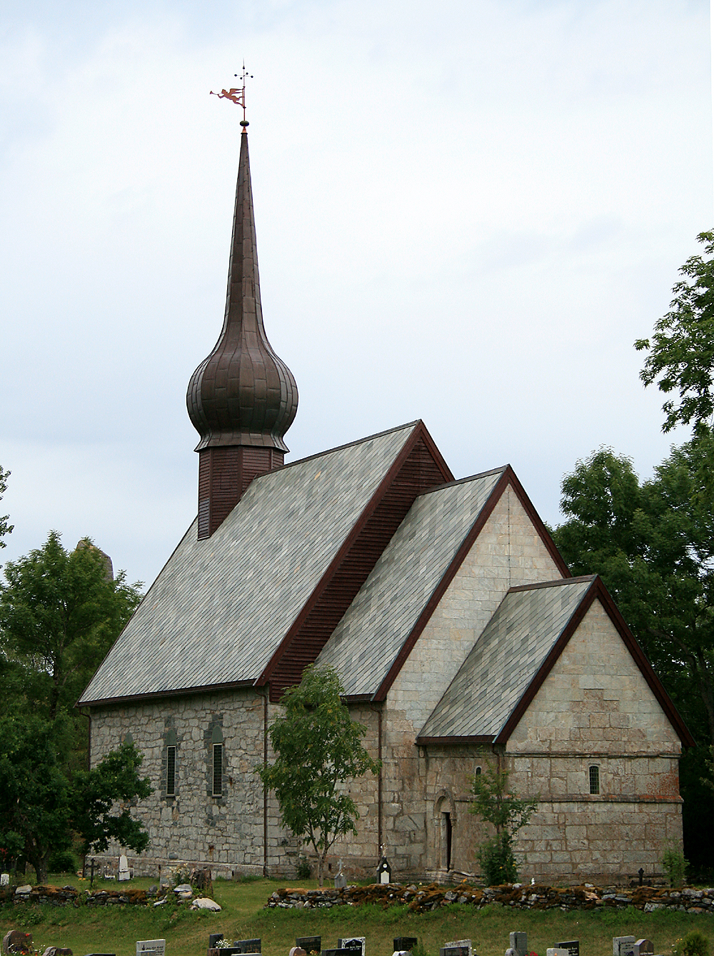 Alstahaug church, Alstahaug, Norway.